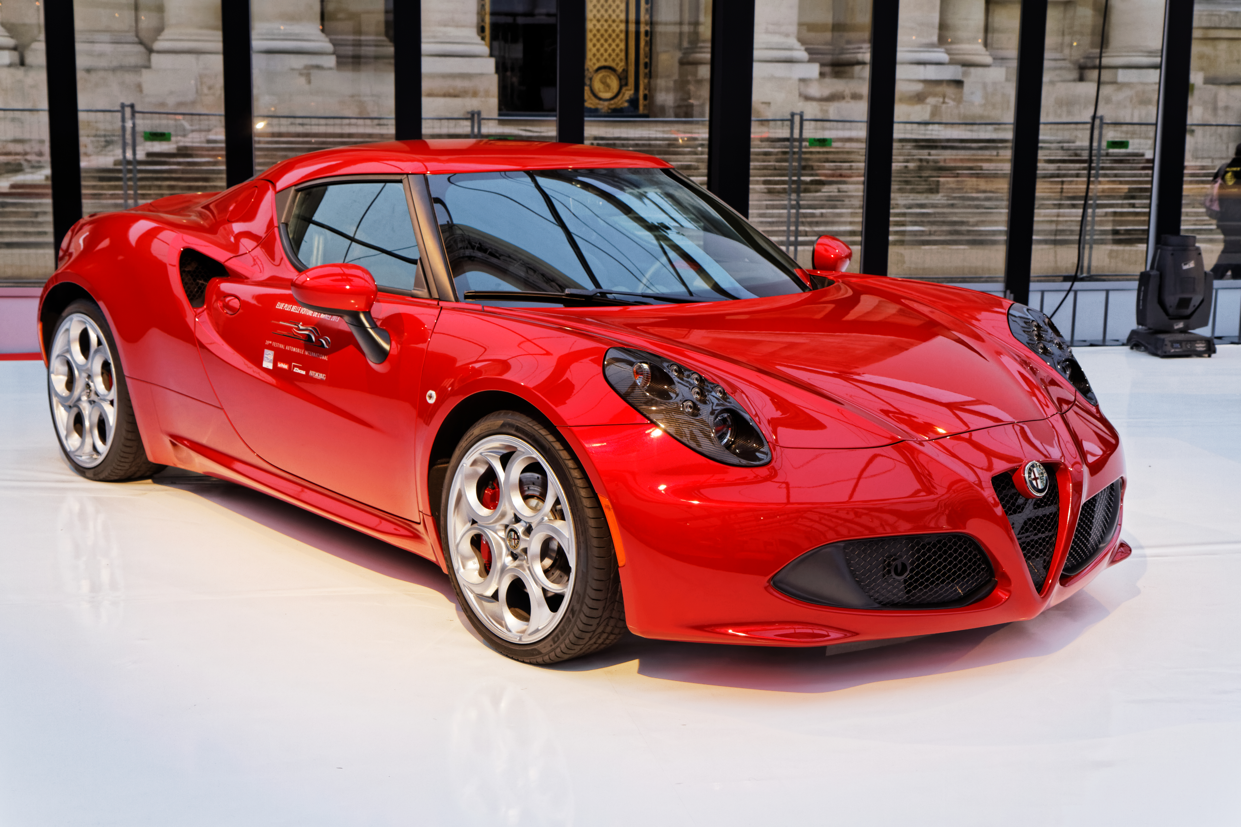 L'Alfa Romeo 4C exposée lors du festival automobile international 2014.